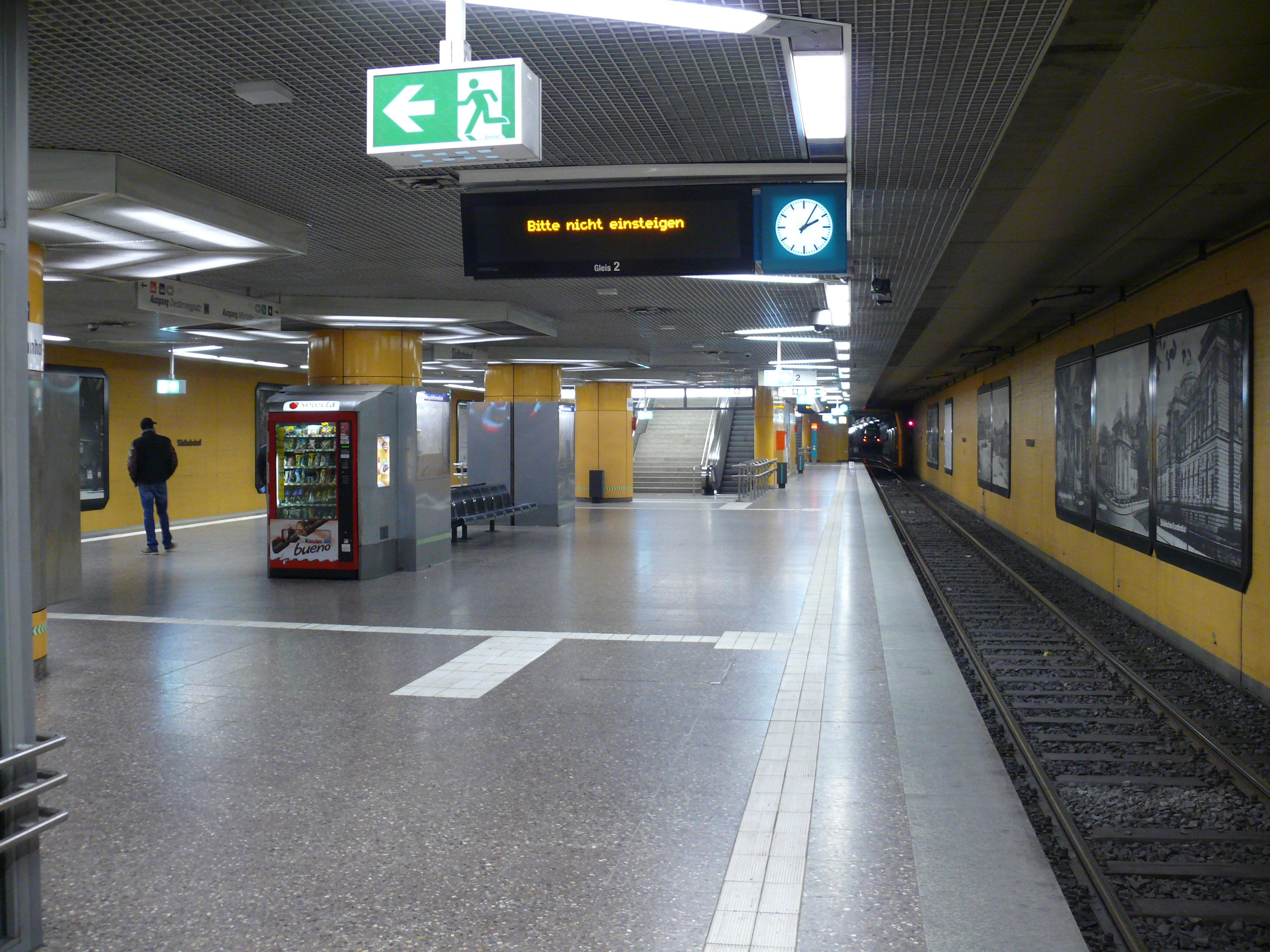 Bahnsteigebene am U-Bahnhof Südbahnhof in Frankfurt.